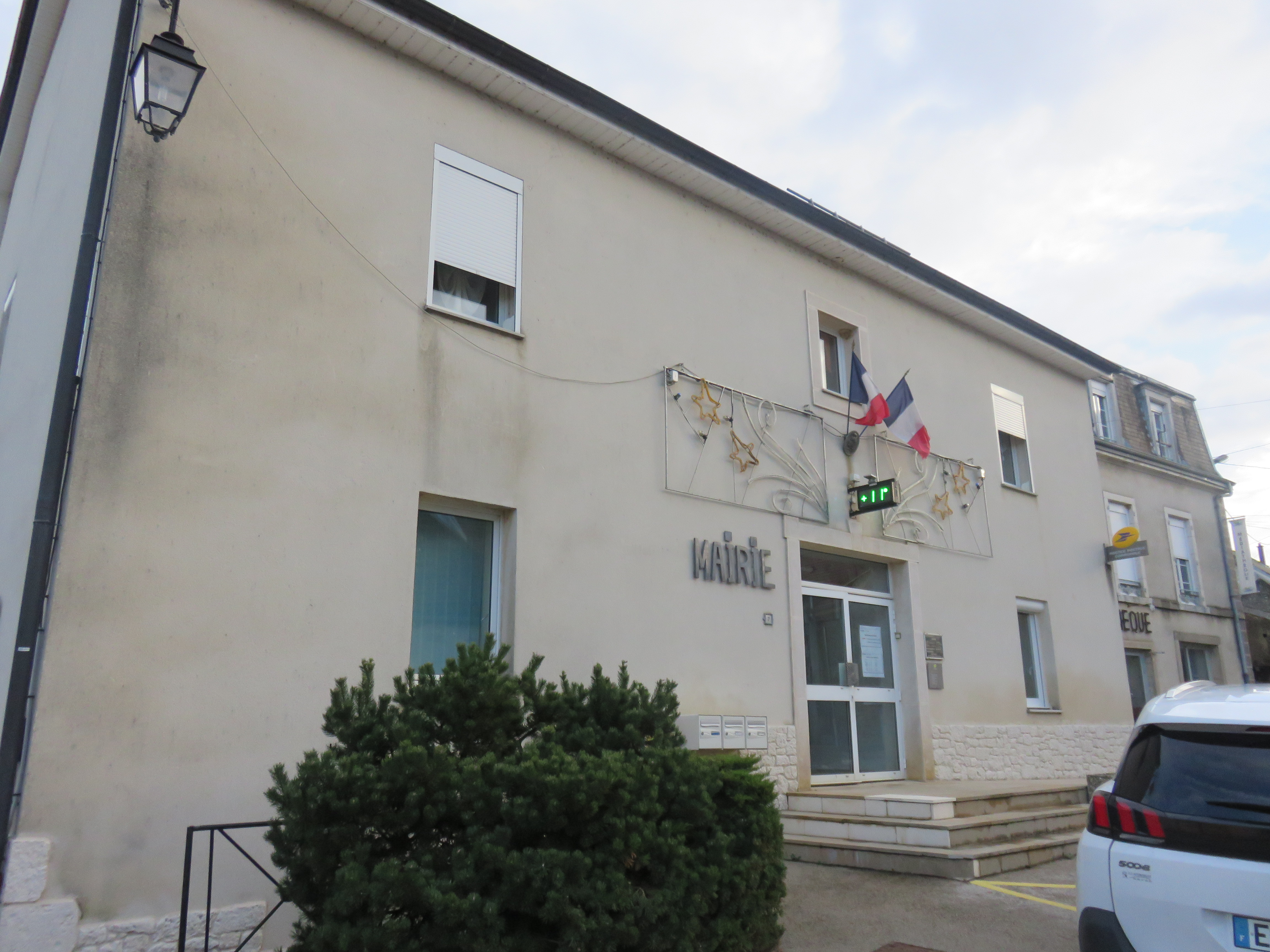 Mairie de Gendrey (Jura, France) en janvier 2018.